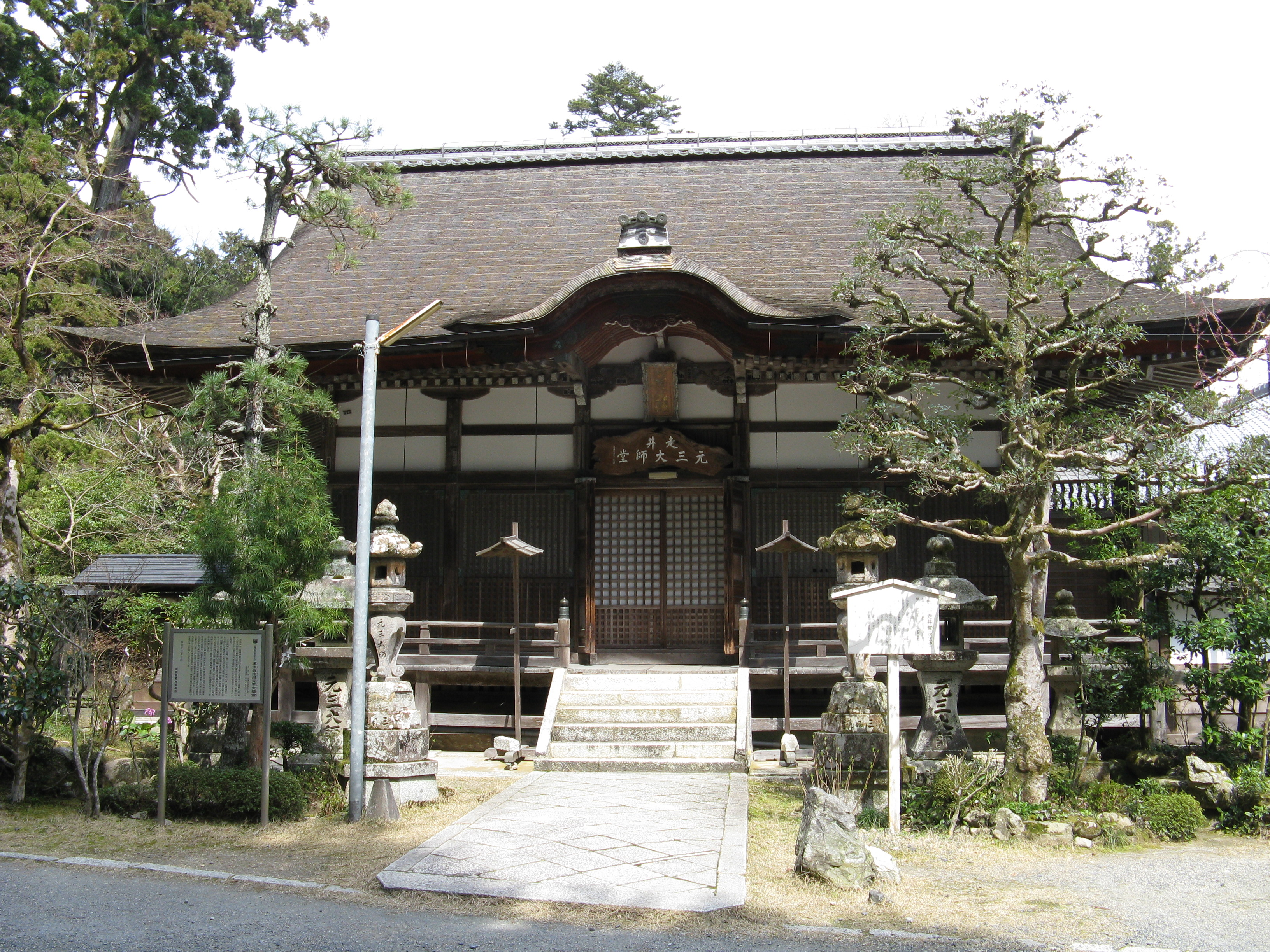 日吉大社 走井堂